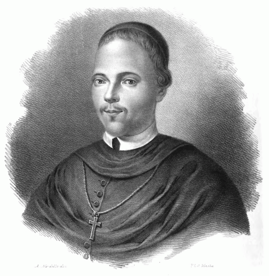 Ignjat Đurđević (Ignazio Giorgi; 1675-1737), Croatian poet and translator